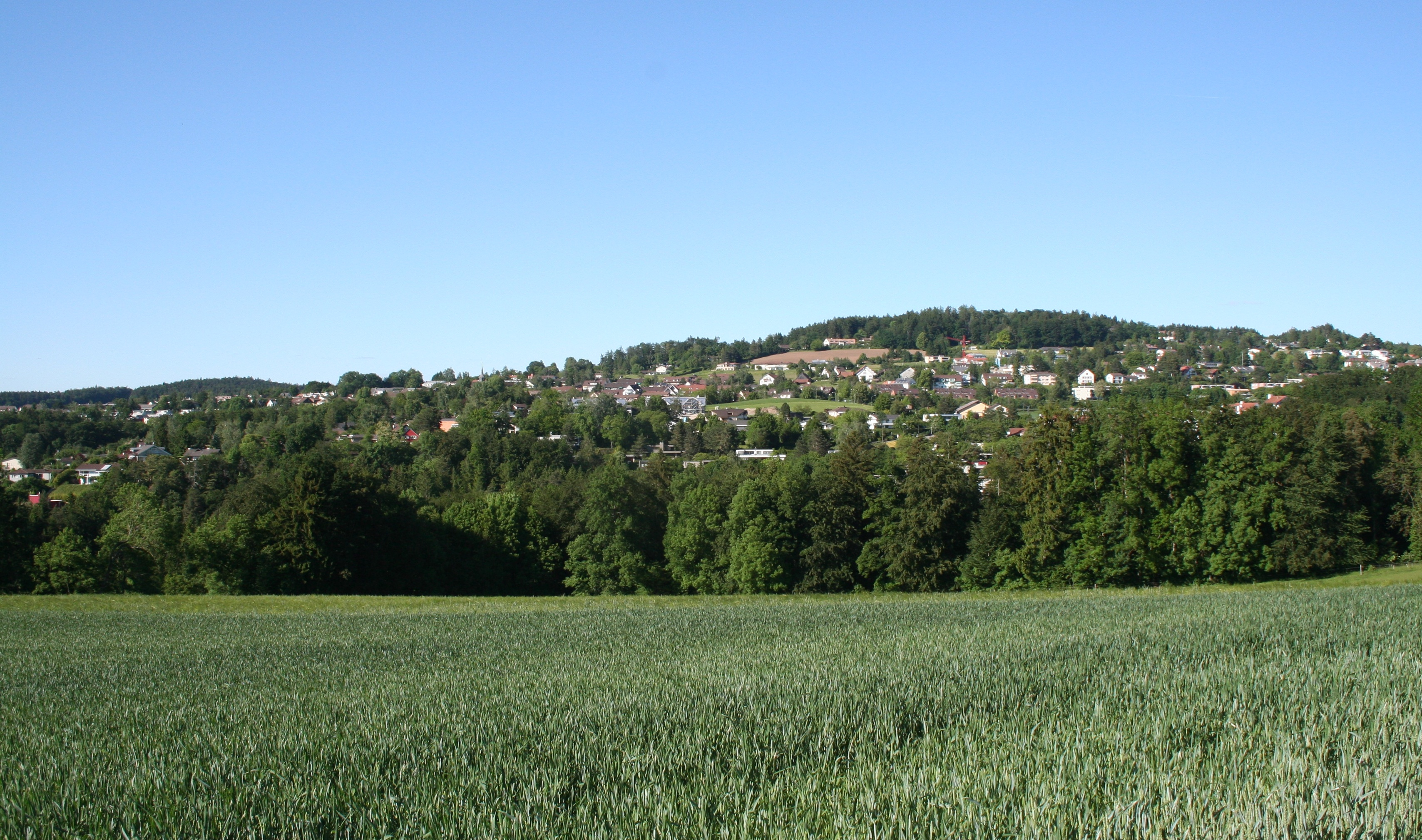 de:Zumikon , Blick nach Nordosten